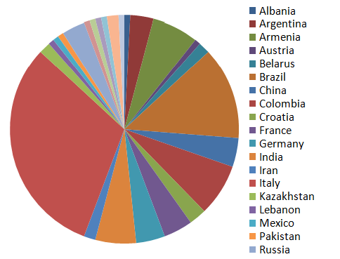 Grafico studenti Dottorato IRAP suddiviso per nazione